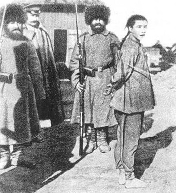 中文（中国大陆）: 俄军绑缚海兰泡中国人准备屠杀